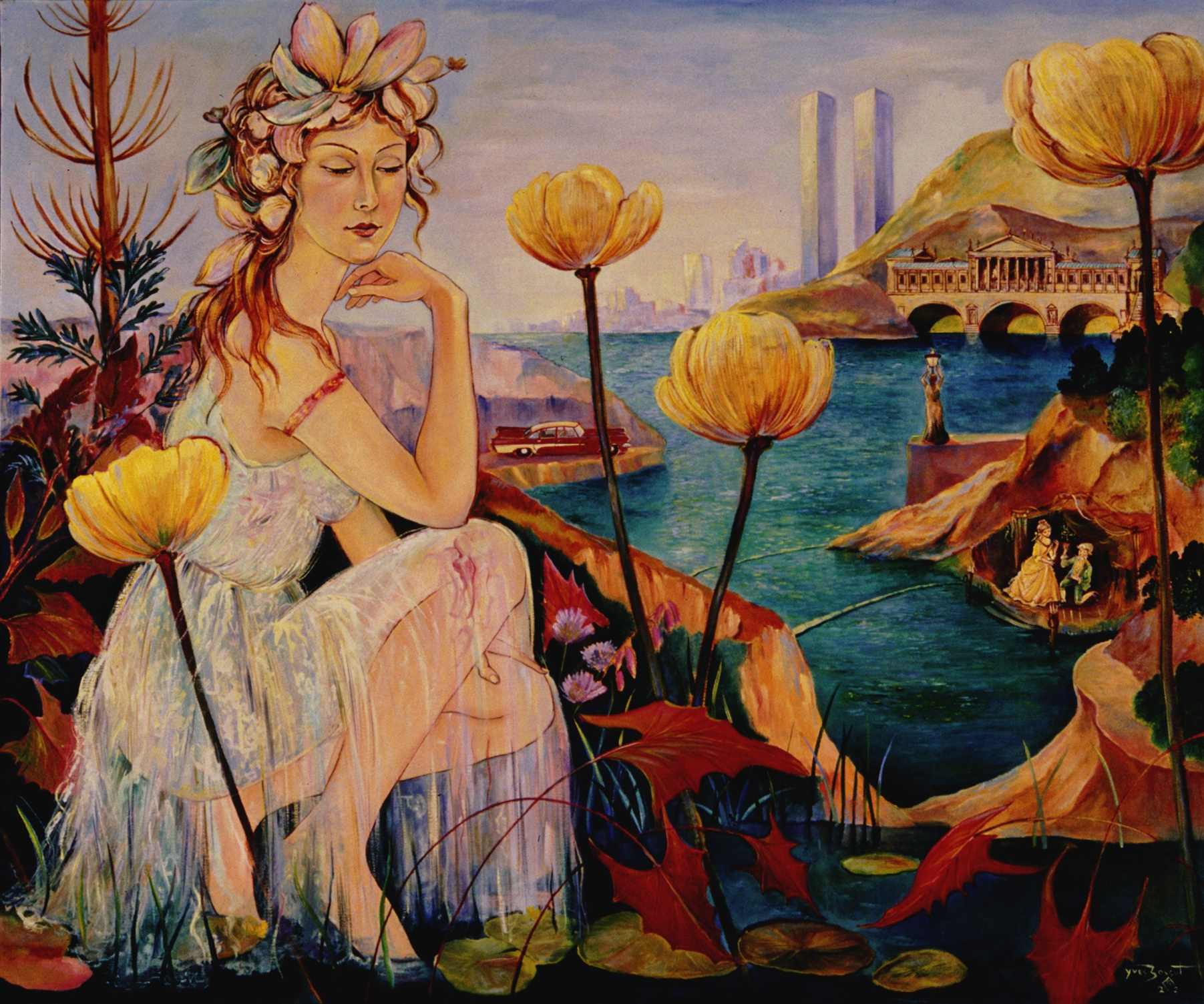 "La Cité des Eaux": Huile sur toile 100x120 cm Tableau de Yves Bossut peint en 19